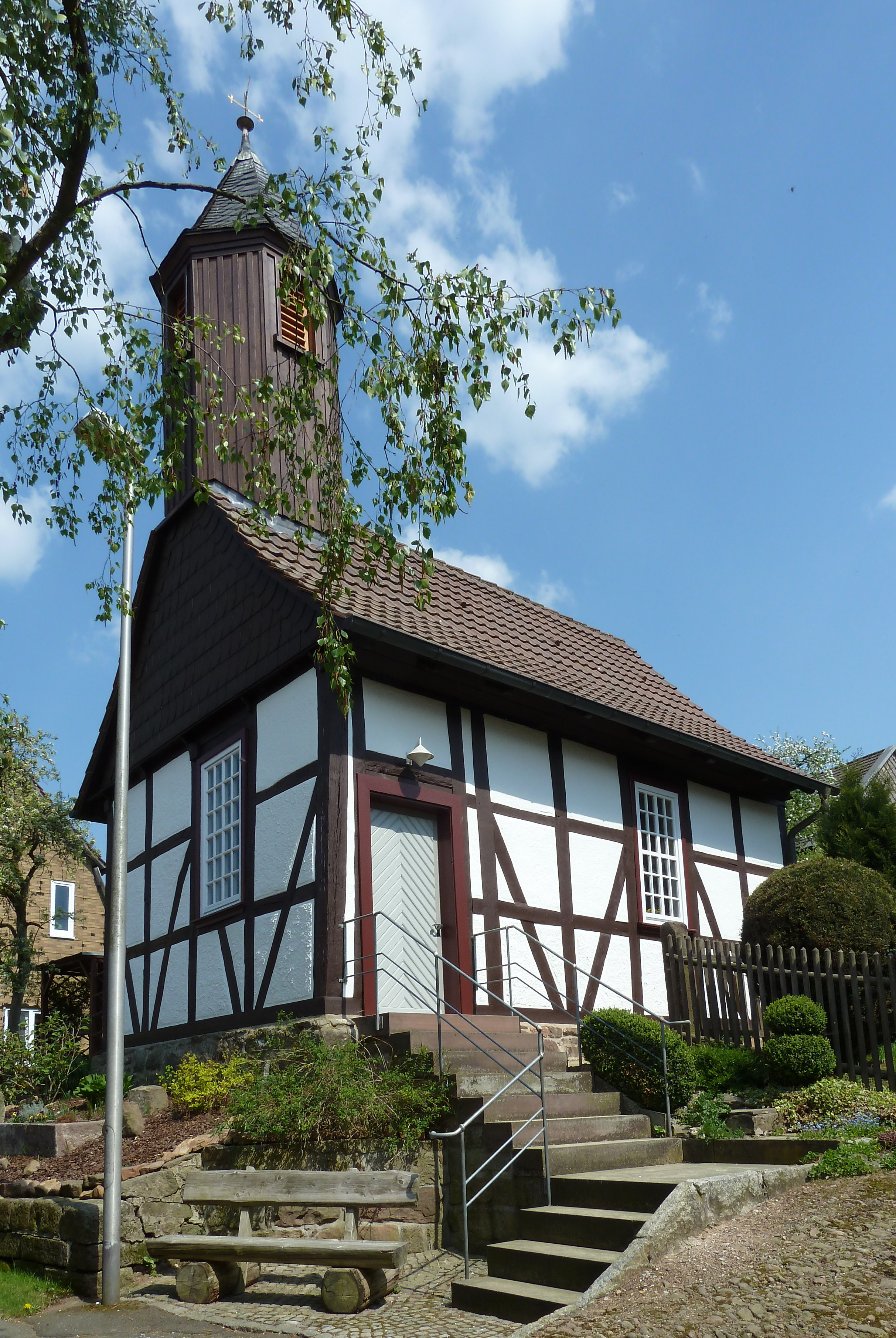 Ev.-luth. Kapelle in Eschershausen, Stadt Uslar, Niedersachsen. Fachwerkkapelle um 1760